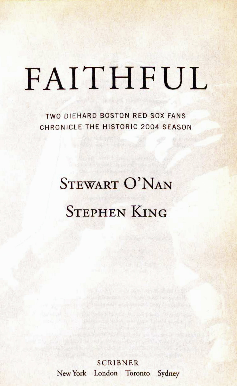 Stewart O’Nan Stephen King Faithful title 2004